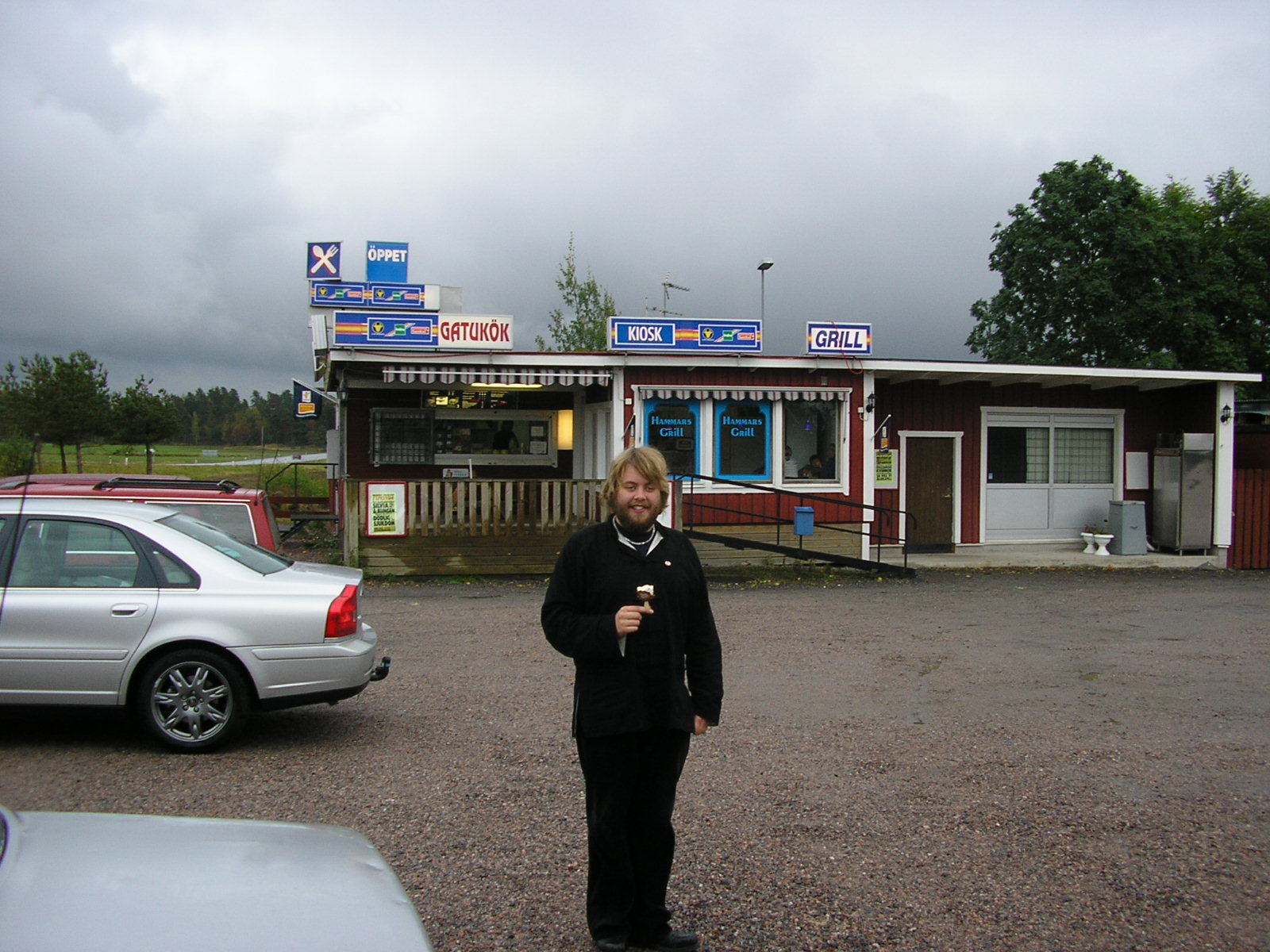 Hammars grill